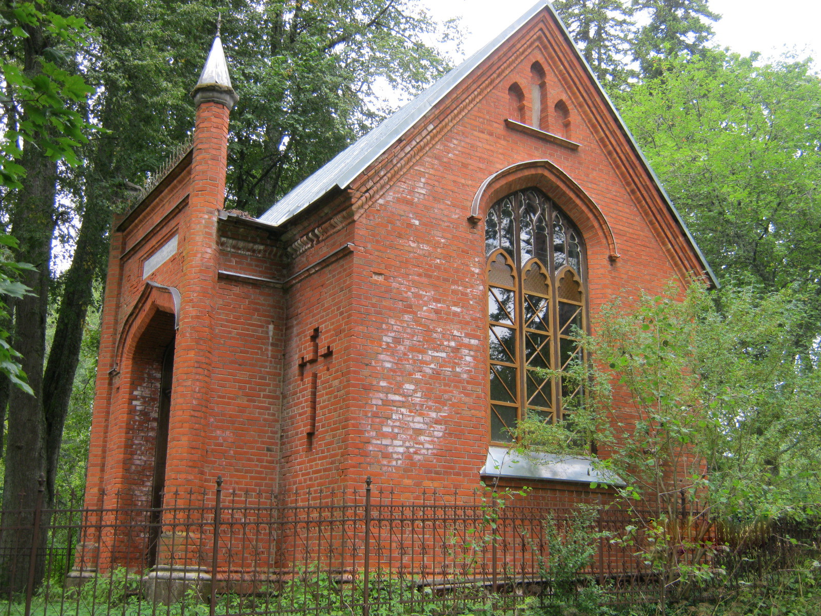 Staël von Holsteinide kabel Urvaste kalmistul